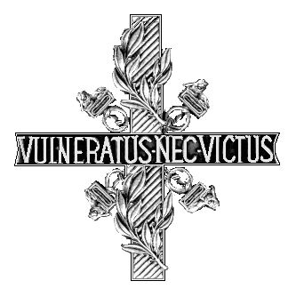 Draaginsigne Gewonden, "VULNERATUS NEC VICTUS" oftewel "verwond maar niet overwonnen"